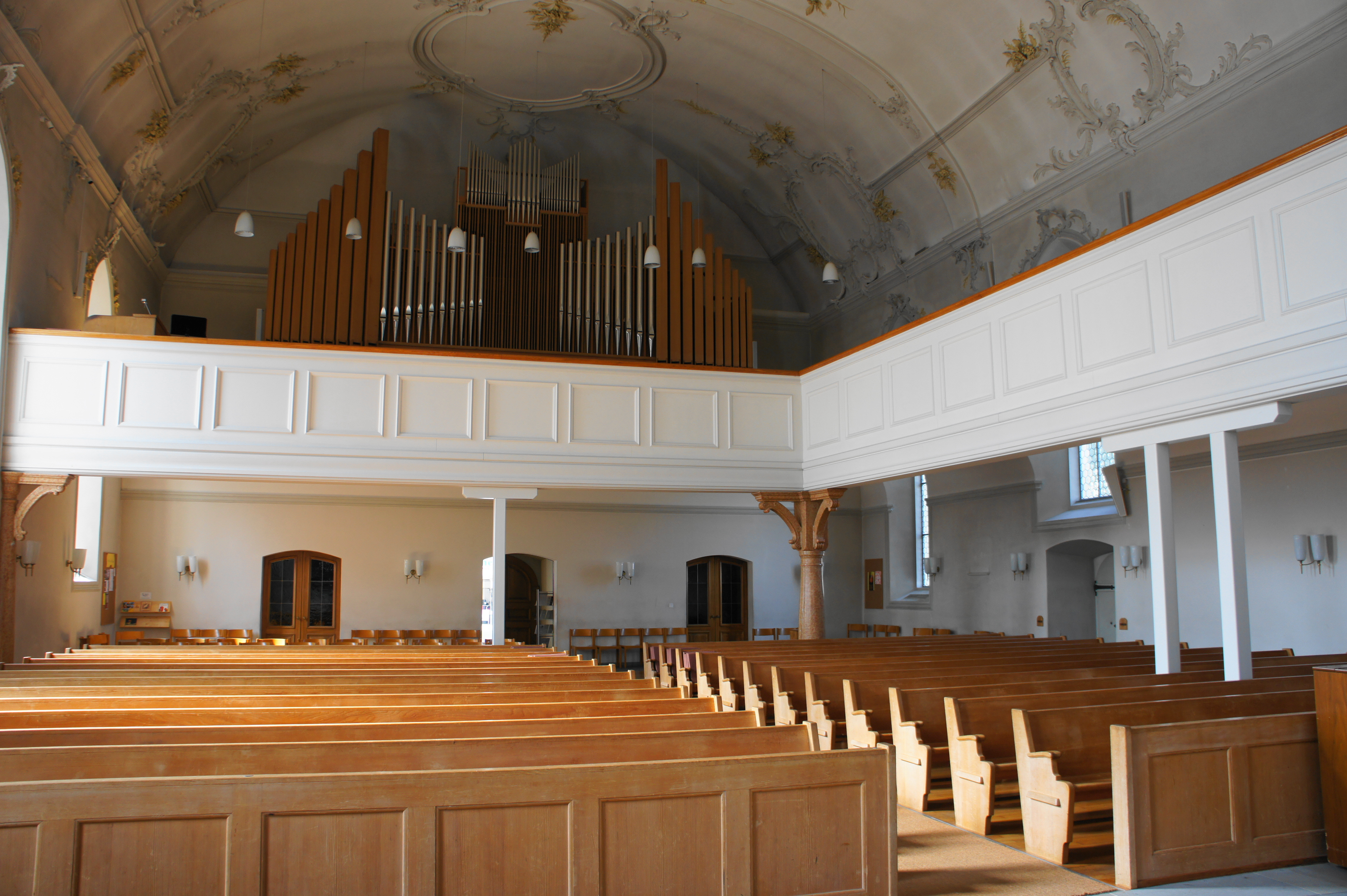 Blick auf die Empore in der ref. Kirche in Herisau. In der Bildmitte ist der Eingang auf der Westseite der Kirche zu erkennen. Darüber auf der Empore ist eine Orgel zu sehen. Die Empore zieht sich auf der Nordwand der Kirche nach vorne Richtung Chorraum.